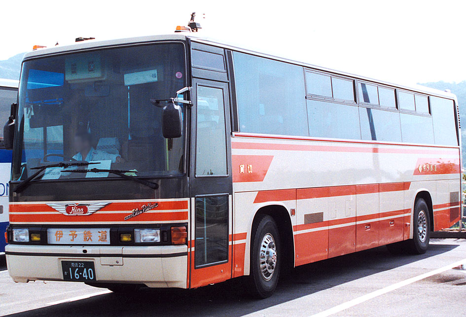 伊予鉄道（旧塗装） 日野 ブルーリボン P-RU637BB